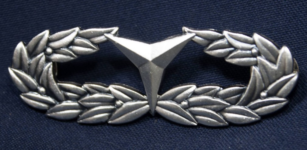 体力1級き章